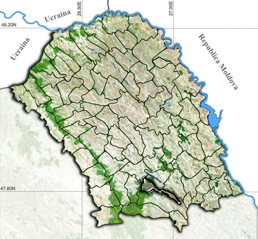 Copalau jud Botosani.